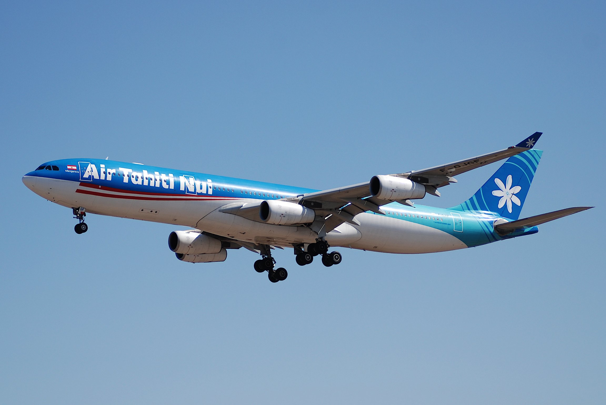 Air Tahiti Nui Airbus A340; F-OJGF@LAX;18.04.2007/463gw